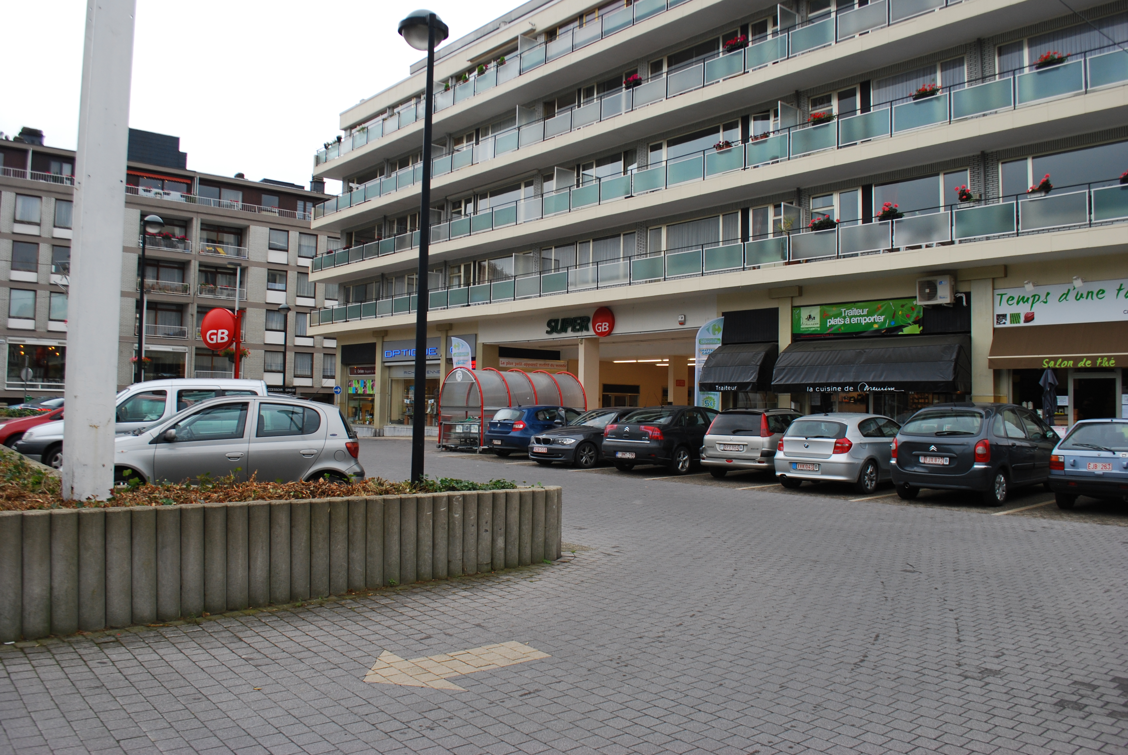 Vue du supermarché GB sur la voie de l'Ardenne à Embourg, au croisement avec la rue Pierre Henvard.